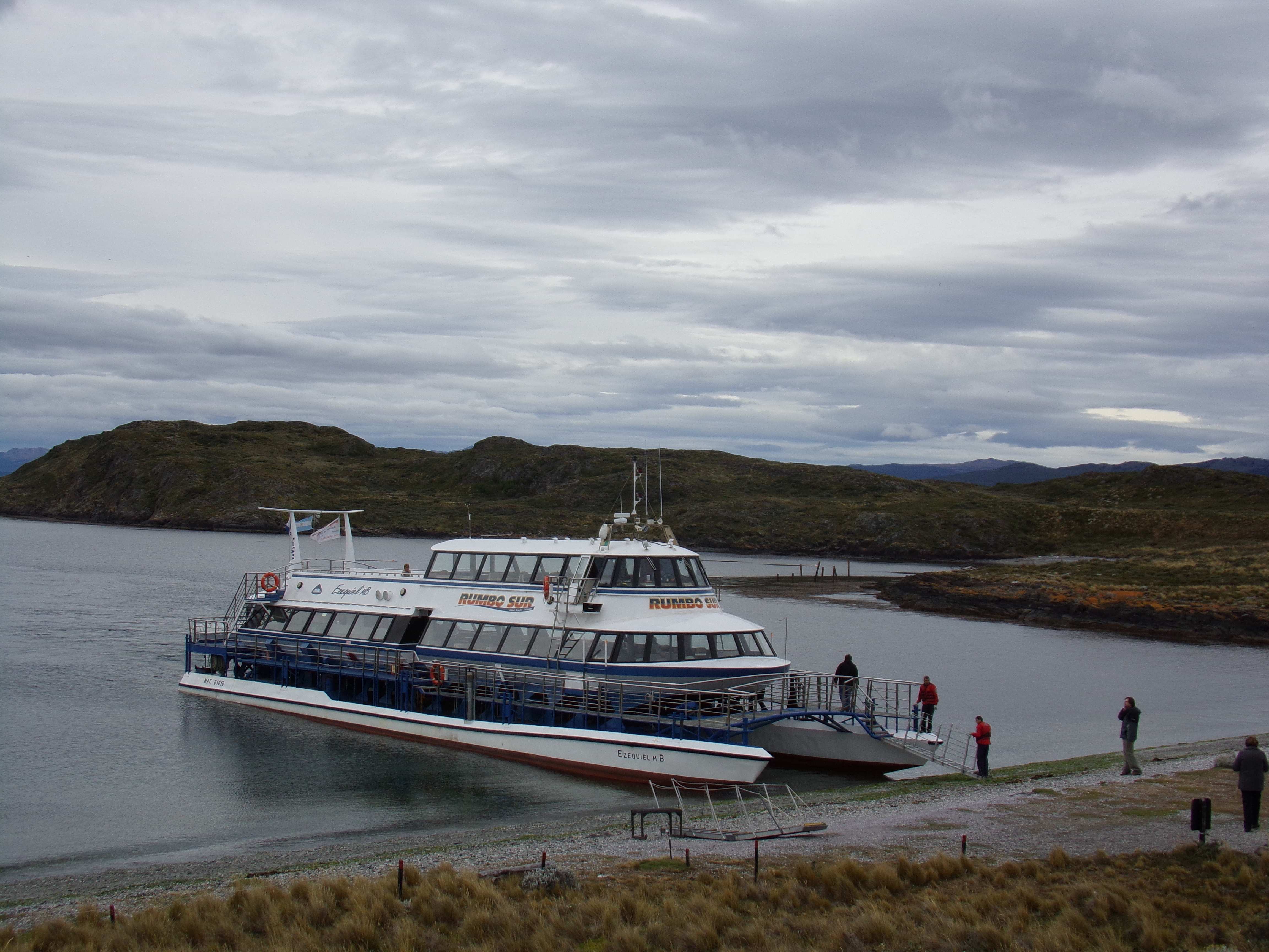 Catamarán visitando las Islas Bridges, Tierra del Fuego, Argentina